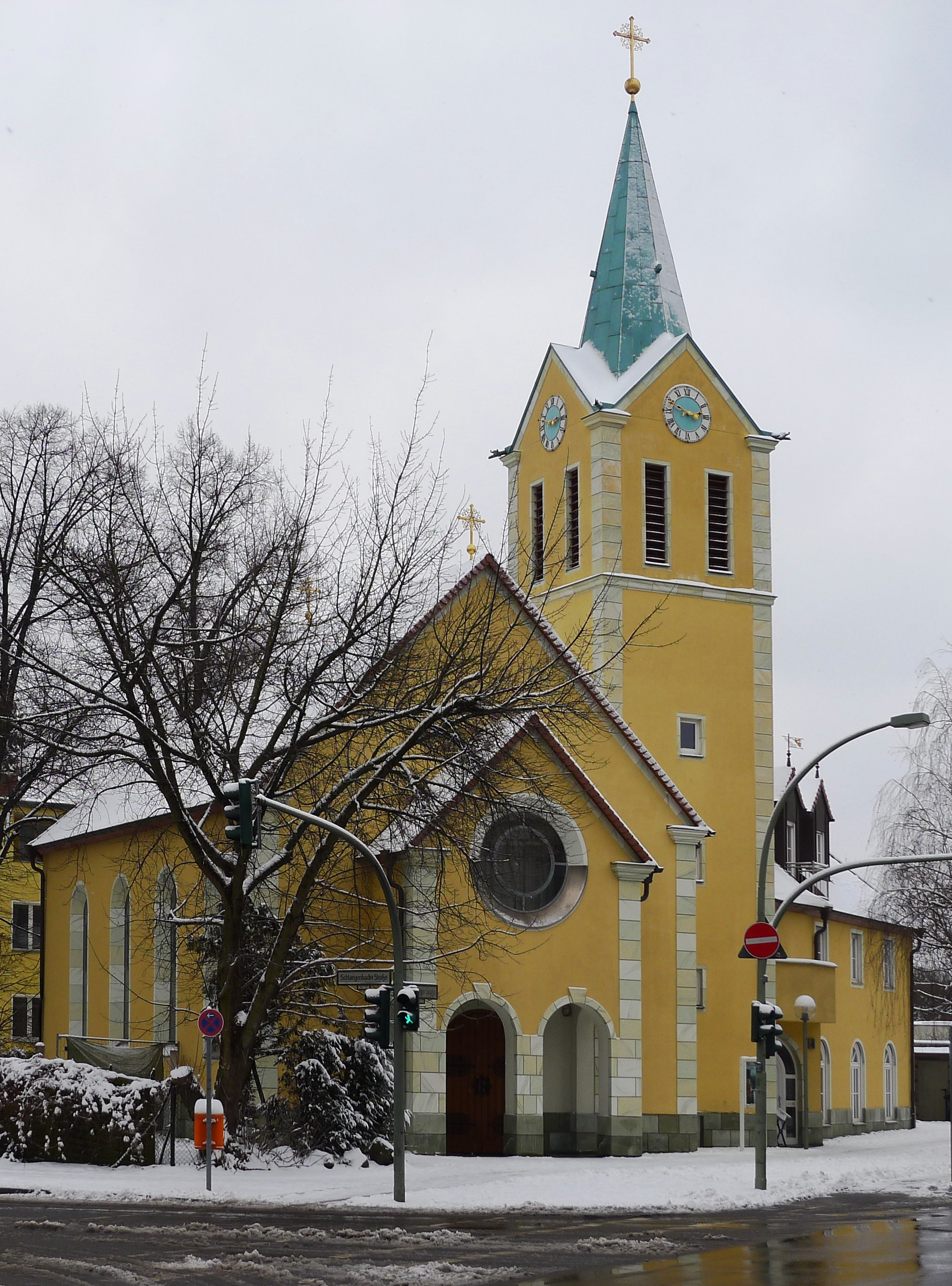 Blick auf die Kirche